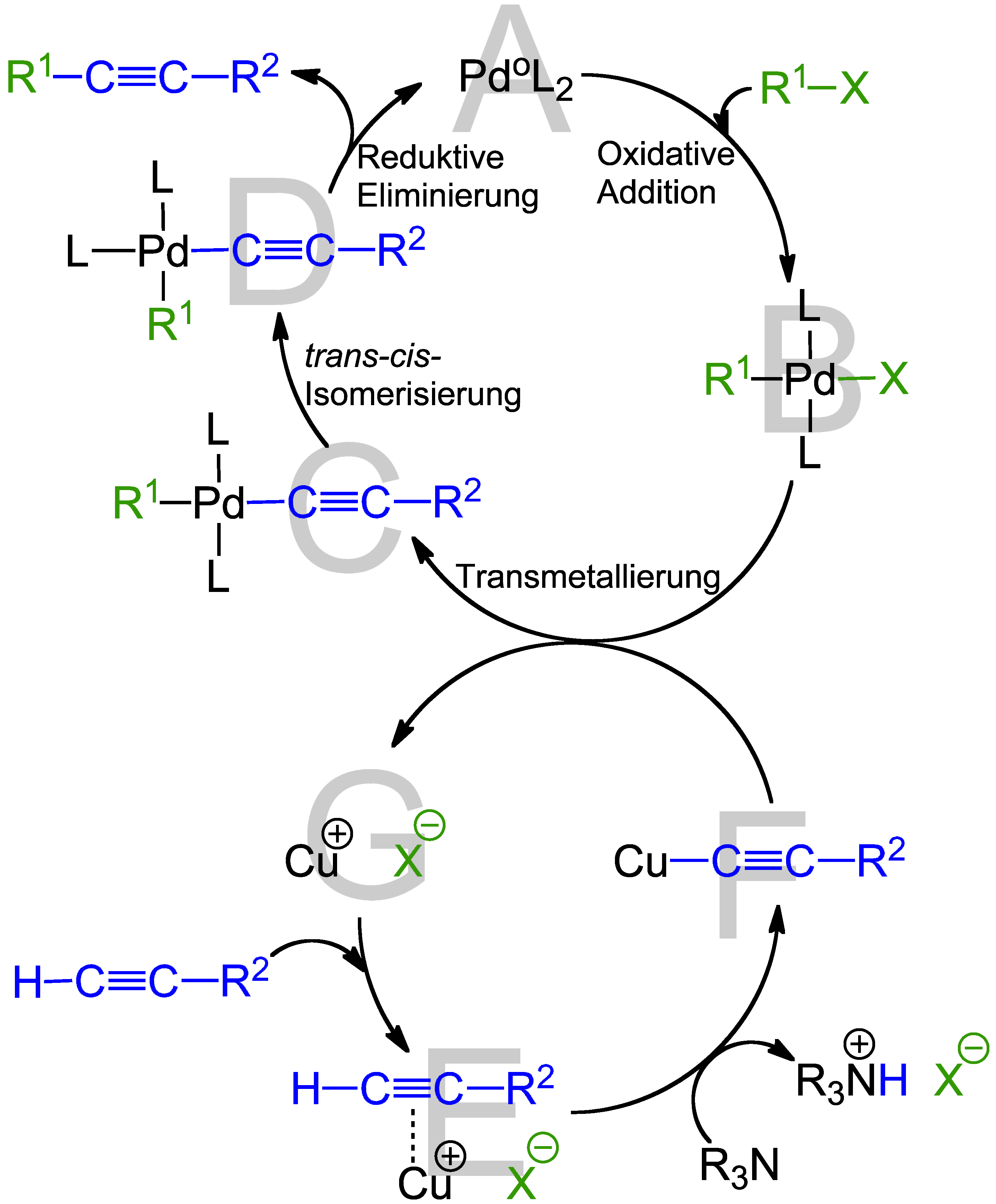 kleine Korrektur gegenüber V1